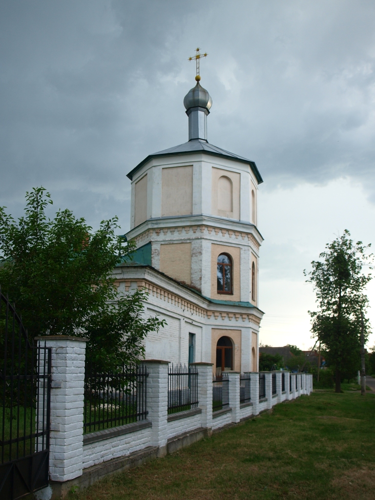 Полтава, с.Горбанівка, храм Різдва Богородиці